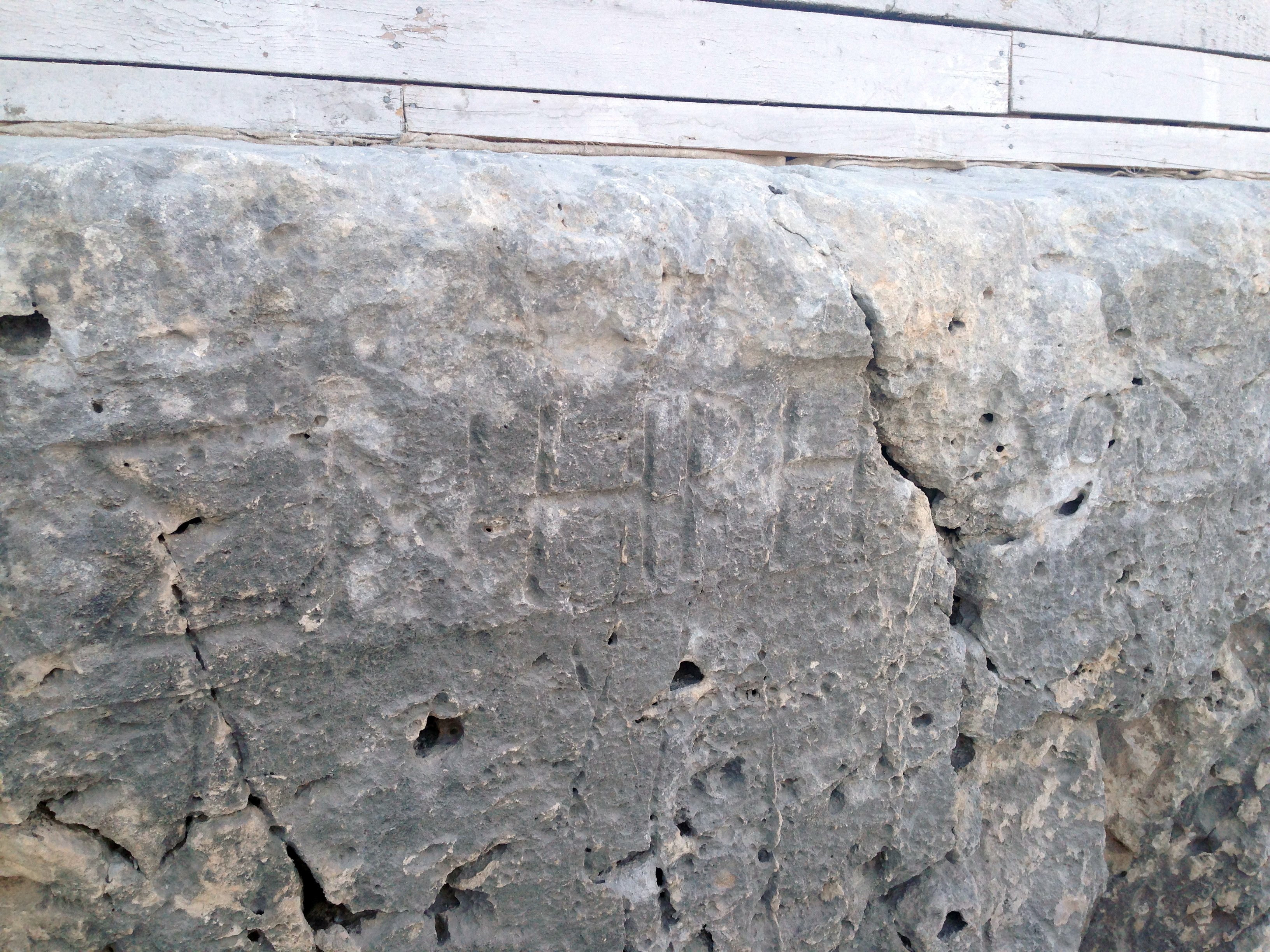 Ancient Greek incriptions at theatre (Syracuse)